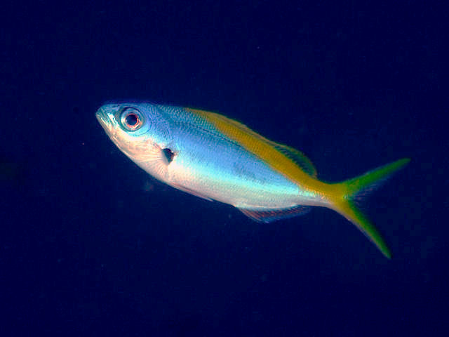 ウメイロモドキ Caesio teres